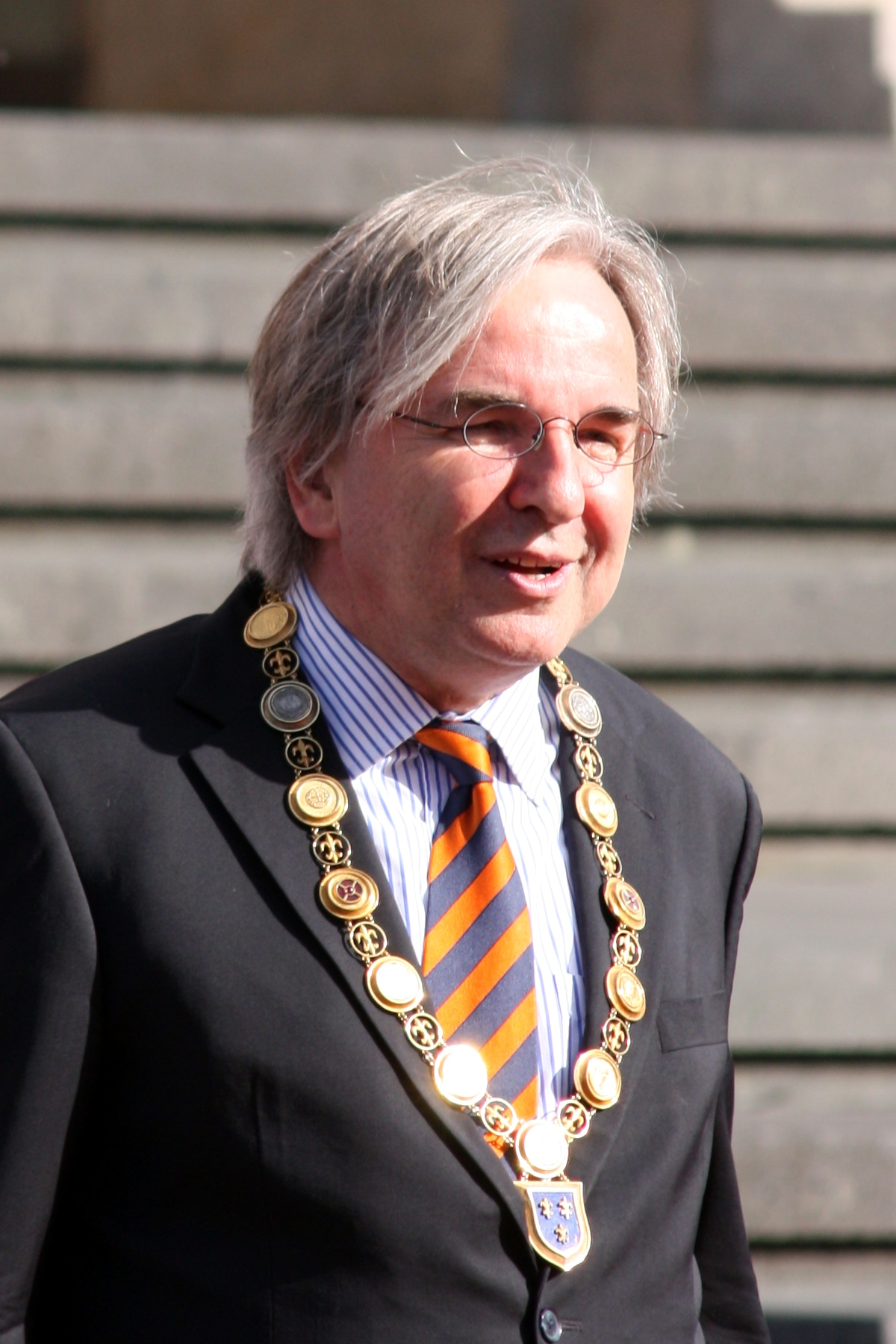 Staatsbesuch von Wilhelm-Alexander van Oranje-Nassau, König der Niederlande in Wiesbaden 2013. Im Bild Helmut Müller (Oberbürgermeister Wiesbaden)